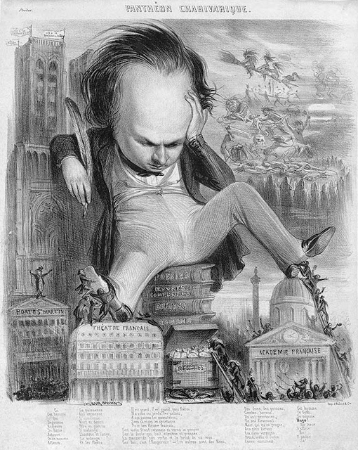 Panthéon charivarique, caricature de Victor Hugo par Benjamin Roubaud dans Le Charivari, 9 décembre 1841.